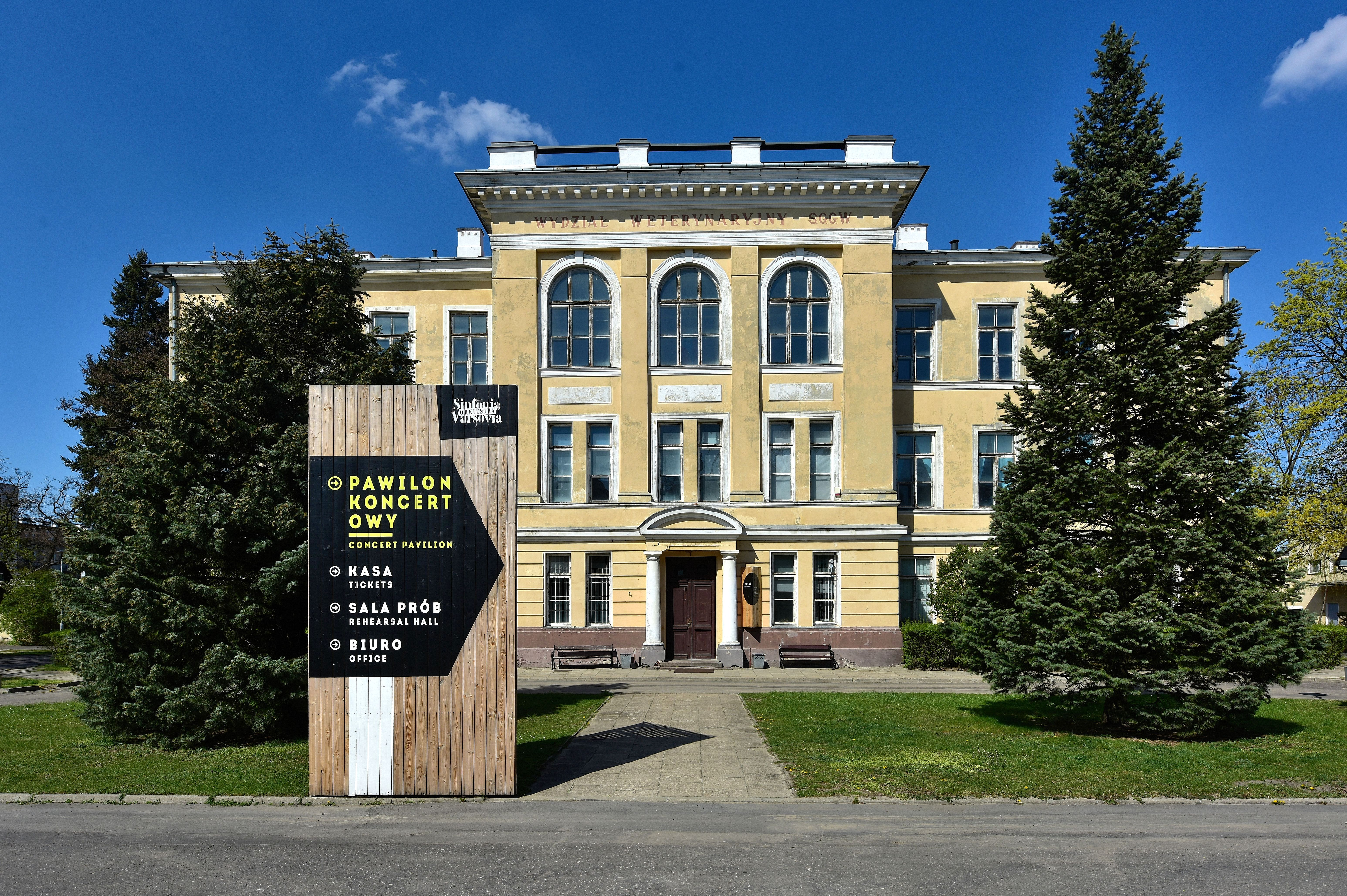 Budynek główny dawnego Instytutu Weterynarii przy ul. Grochowskiej 272 w Warszawie